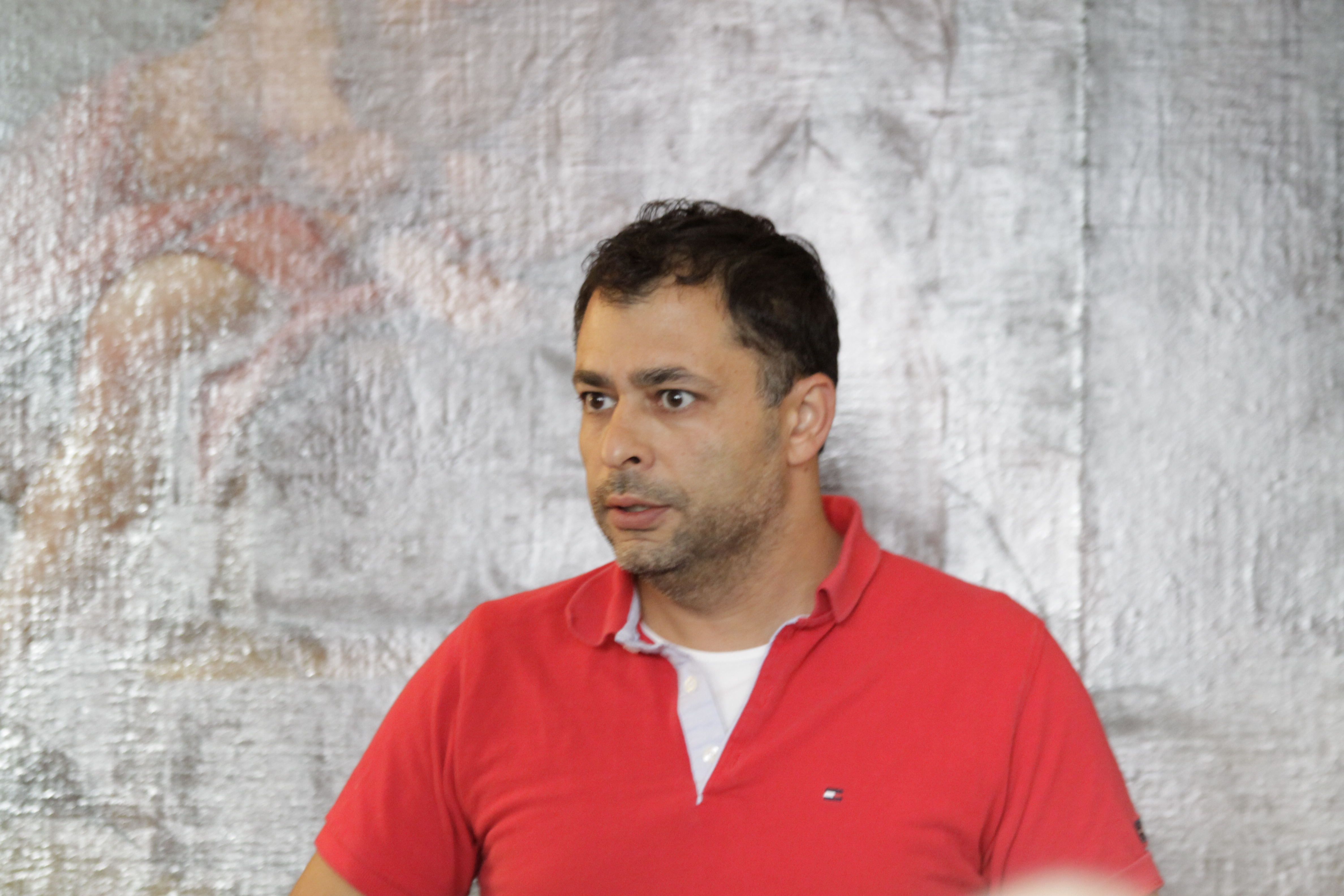 Omar Marzouk i Trykkefrihedsselskabet